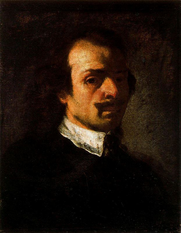 Autoritratto